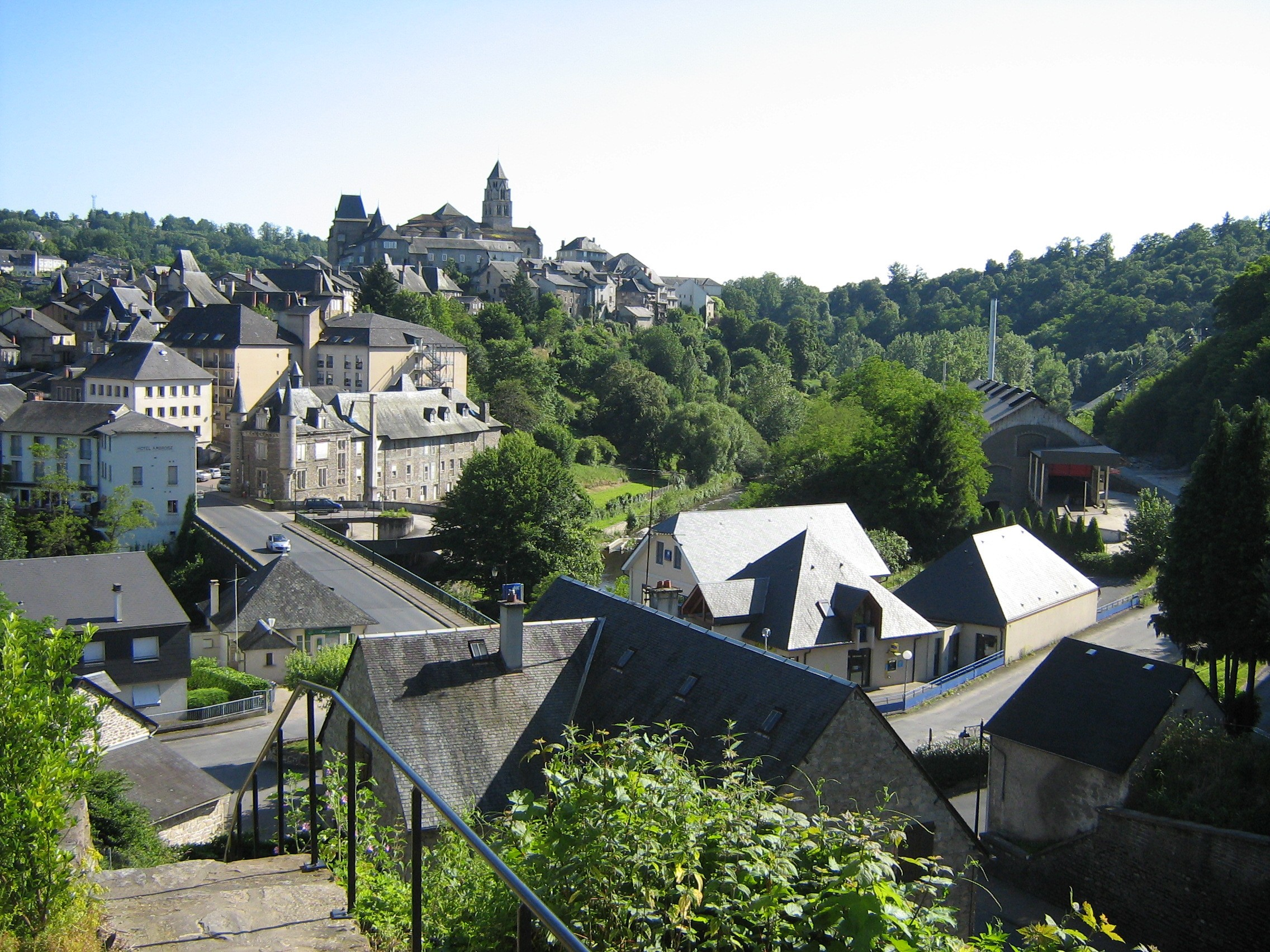 Uzerche vue générale